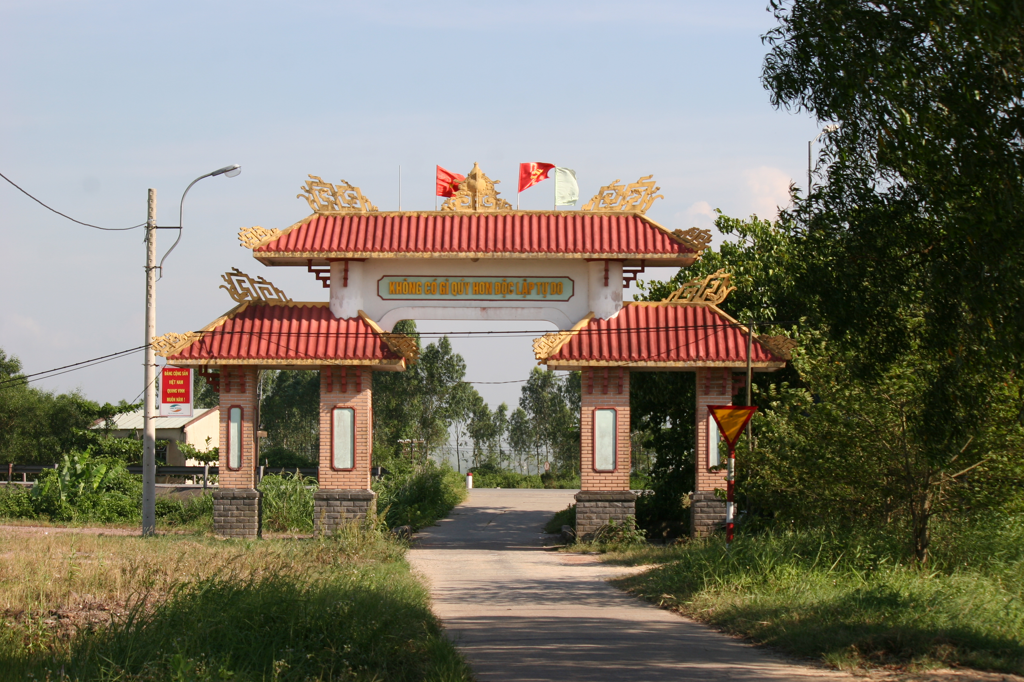 Hình chụp cận cảnh công trình